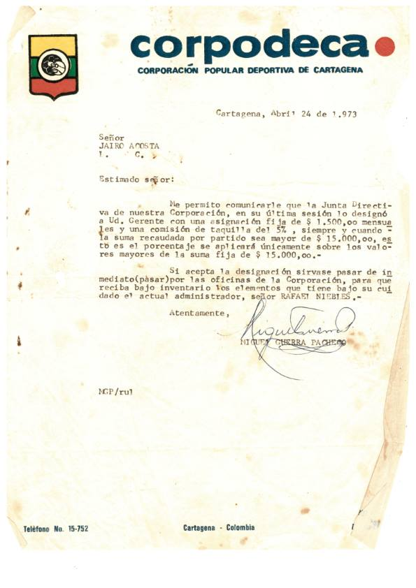 Carta Corpodeca